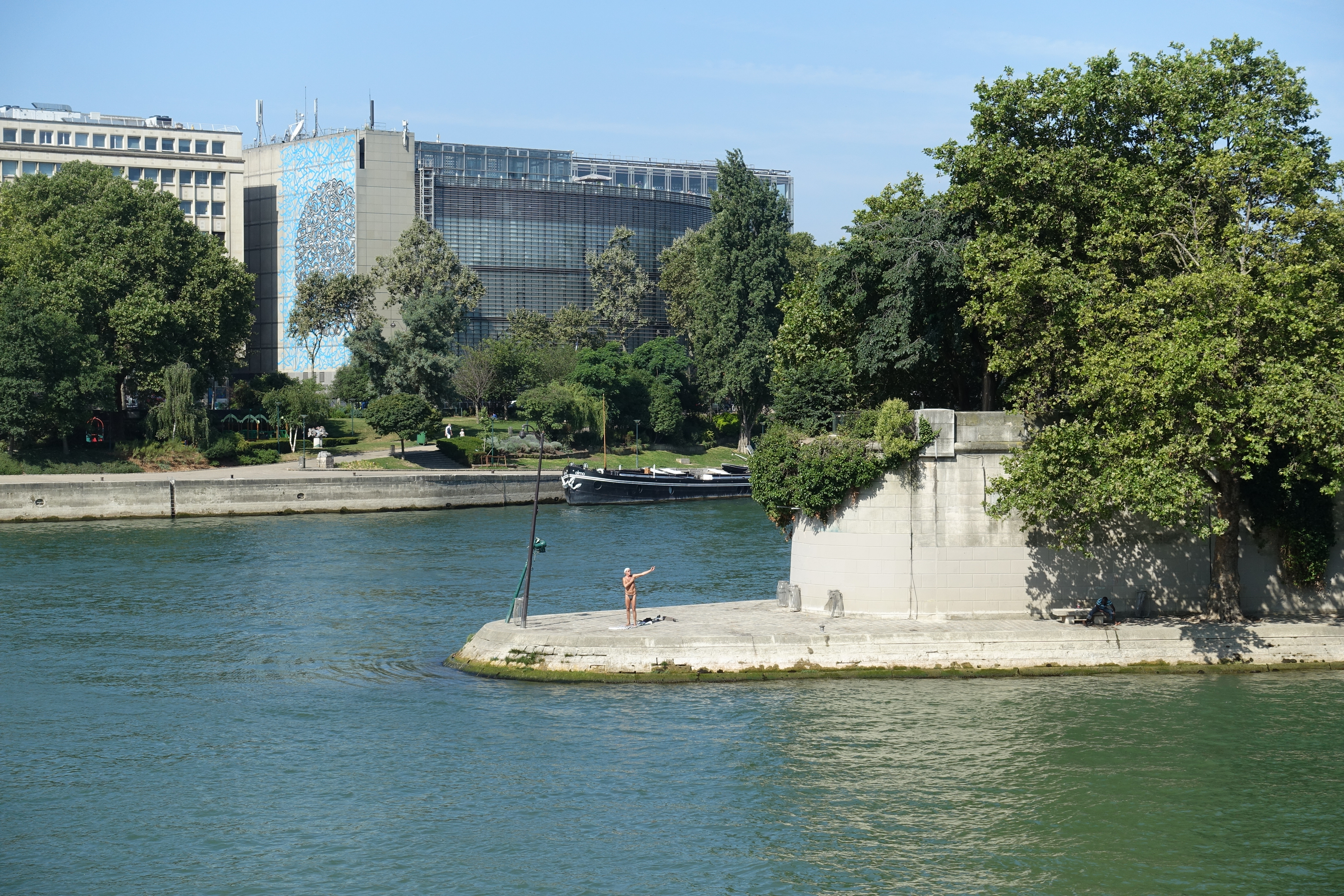 Exercice @ Seine @ Paris